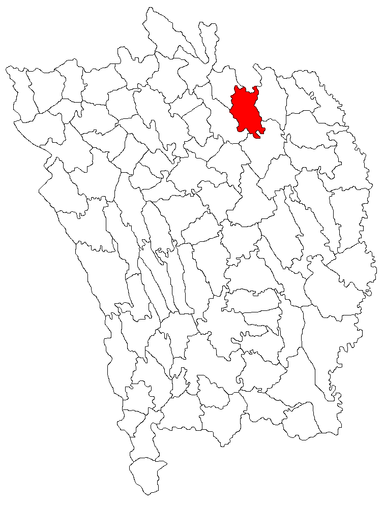 Categorie:Hărţi ale judeţului Vaslui